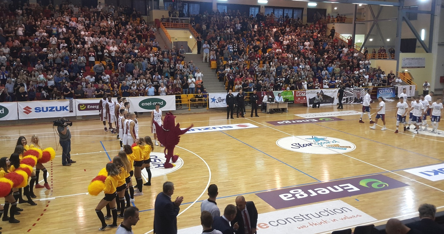 Stargard. Derby Spójnia - King (06.10.2018)